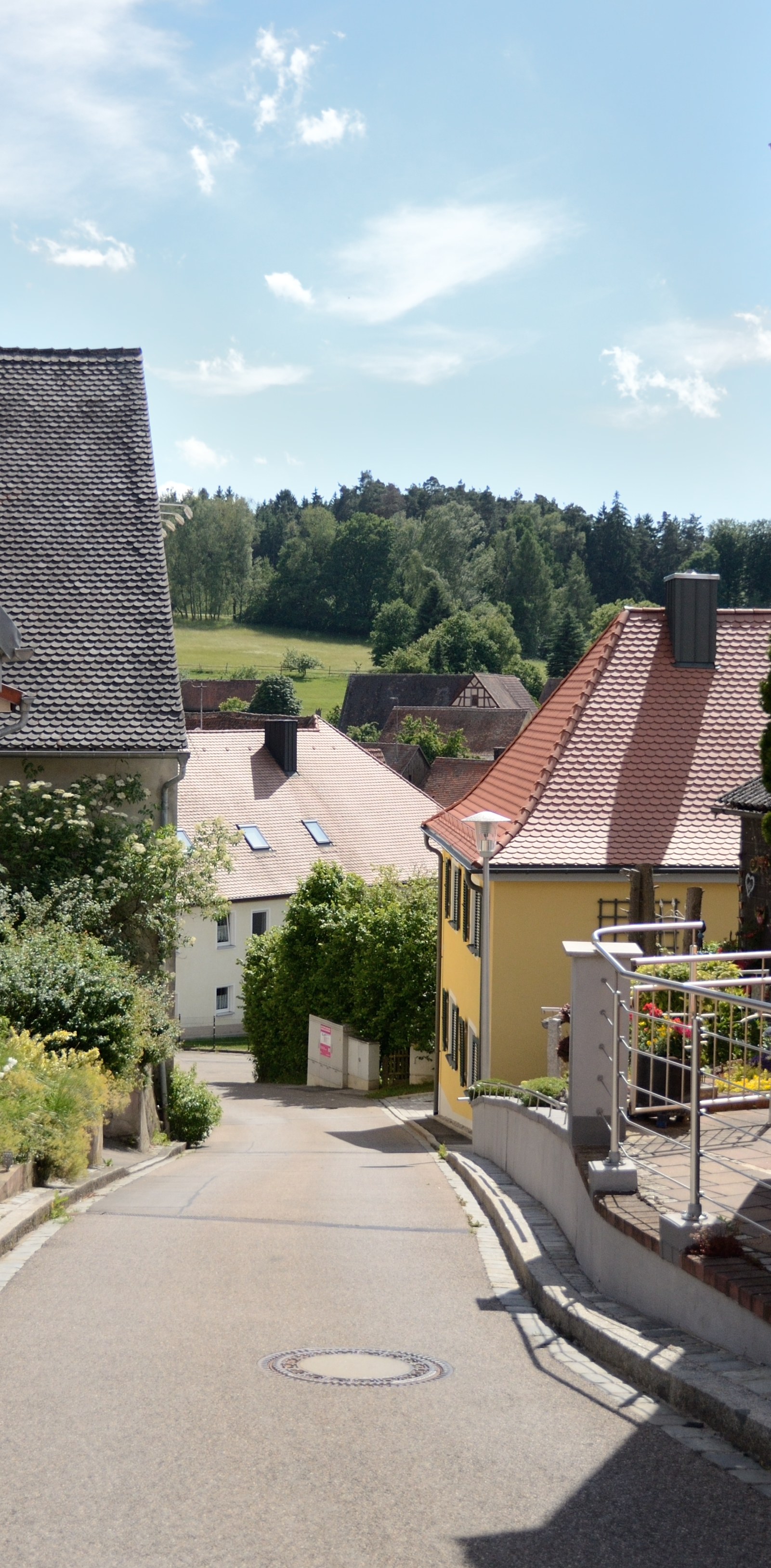 Brodswinden, Zufahrt zum Wendelsbuck